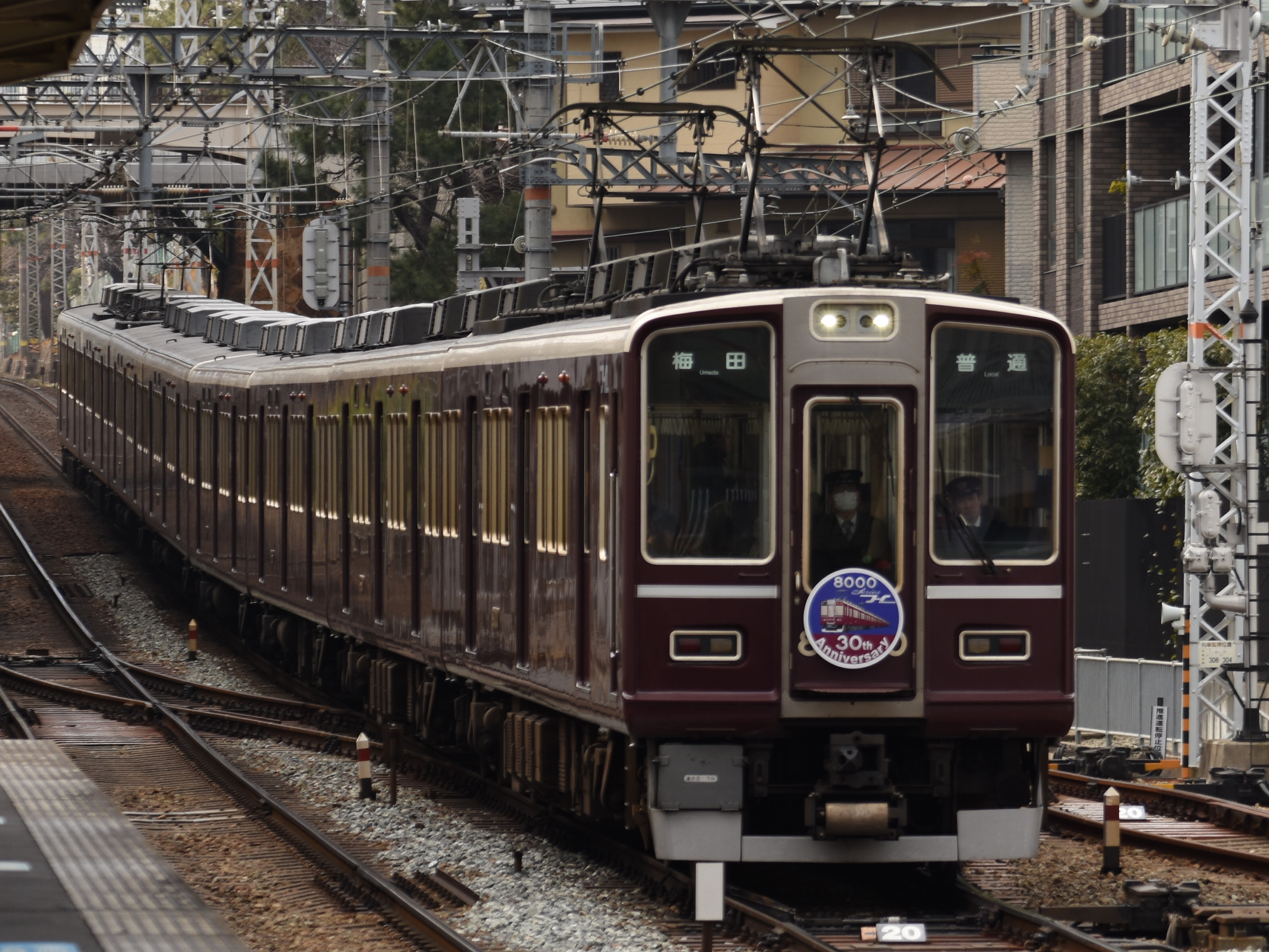 阪急電鉄8000系の登場30周年を記念したラッピング